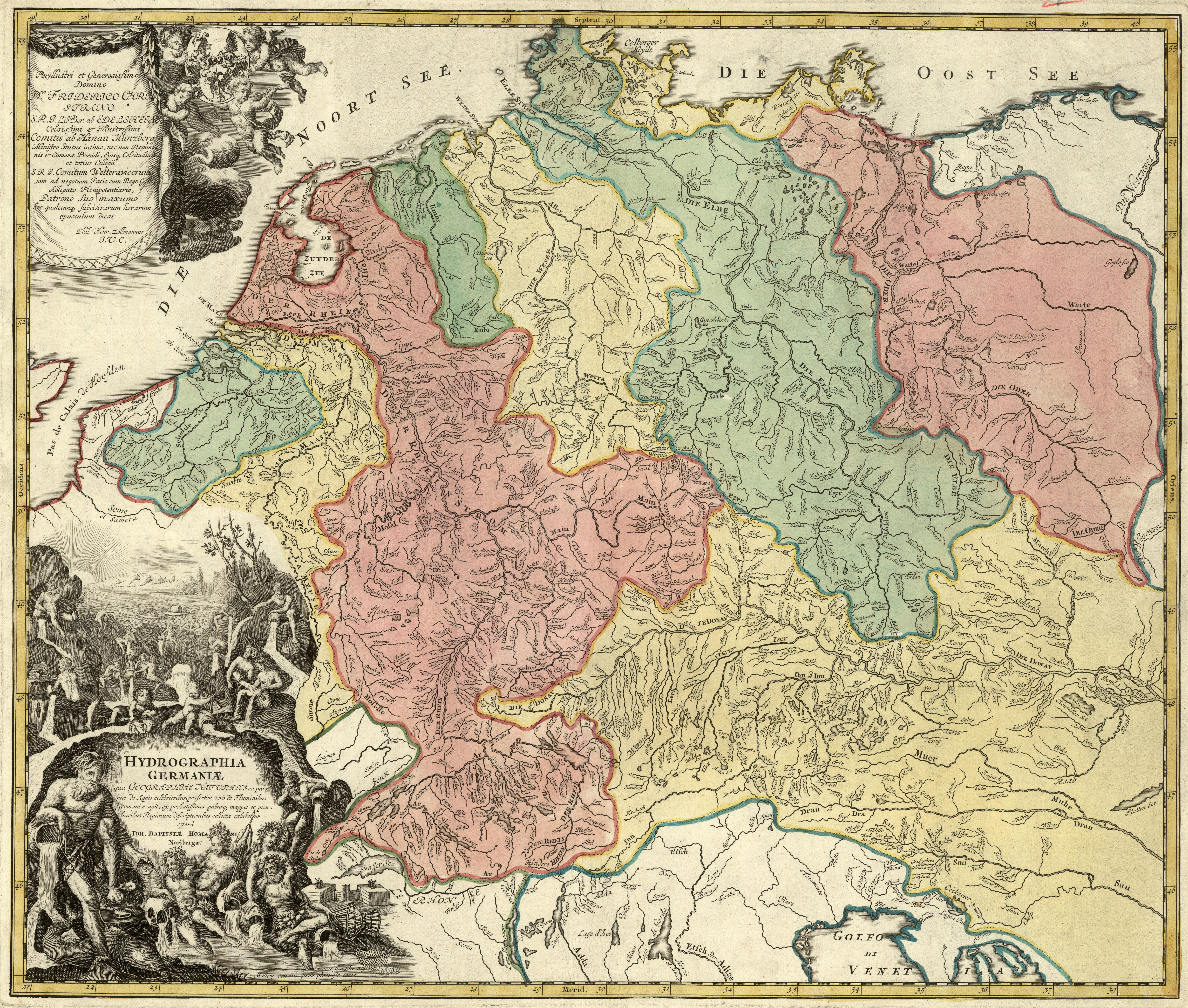 Hydrographia Germaniae qua Geographiae Naturalis ca pars quae de Aquis celebrioribus, praesertim vero de Fluminibus Germaniae agit, ex probatissimis quibusq; mappis et peculiaribus Regionum descriptionibus collecta Perillustri et Generosissimo Domino Dno. Friderico Christiano S. R. I. Lib. Bar. ab Edelsheim Celsissimi et Illustissimi Comitis ab Hanau Münzberg Ministro Status intimo, nec non Regiminis et Camerae Praesidi, Ejusq; Celsitudinis et totius Collegii S. R. I. Comitum Wetteravicorum jam ad negotium Pacis cum Rege Gall: Ablegato Plenipotentiario, Patrono suo maxumo hoc qualecunq; subcisivarum horarum opusculum dicat / Phil. Henr. Zollmannus J. V. C. exhibetur operâ Ioh. Bapristae Homanni Norimbergae